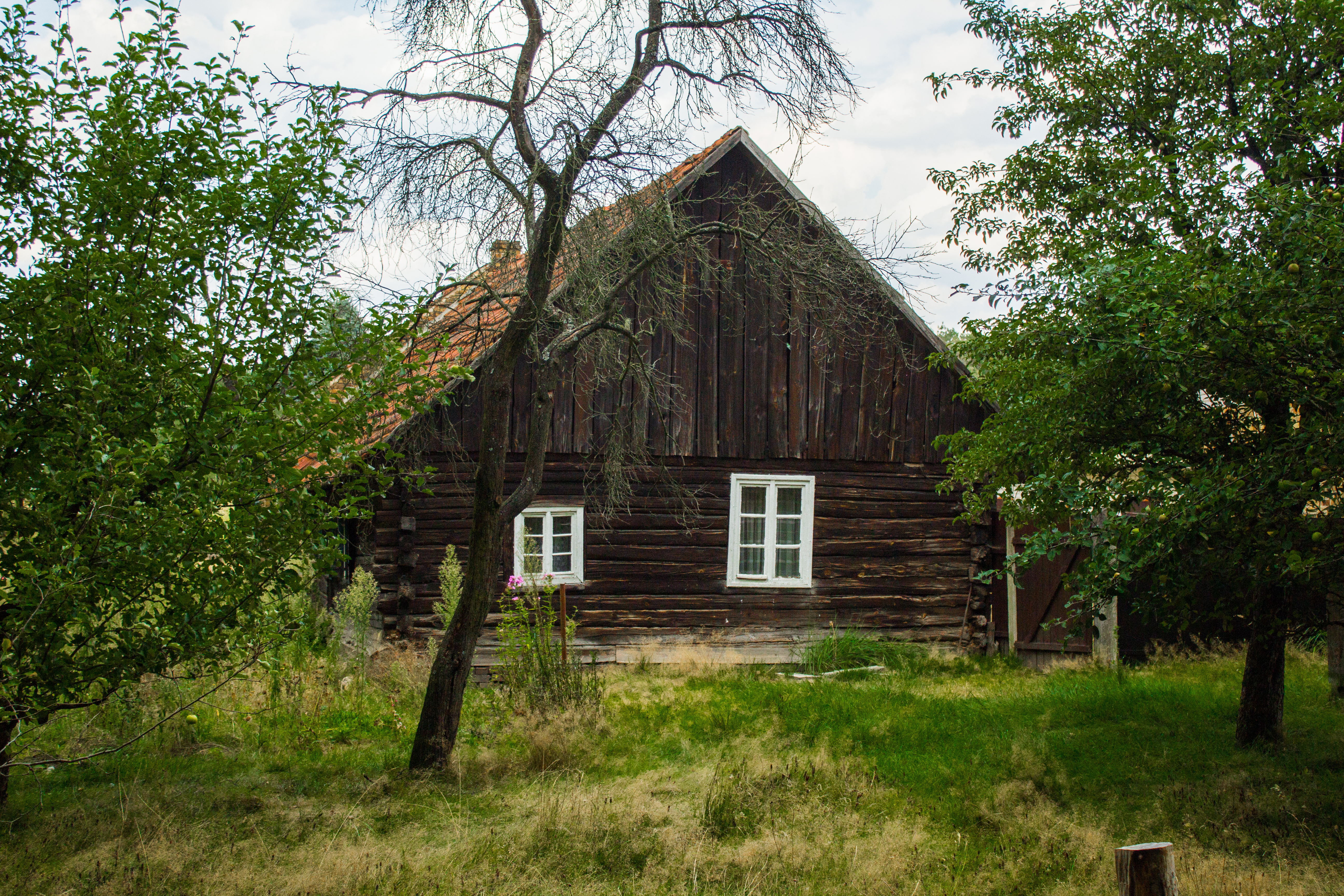 Schäferstraße 85, Rohne (Trebendorf)